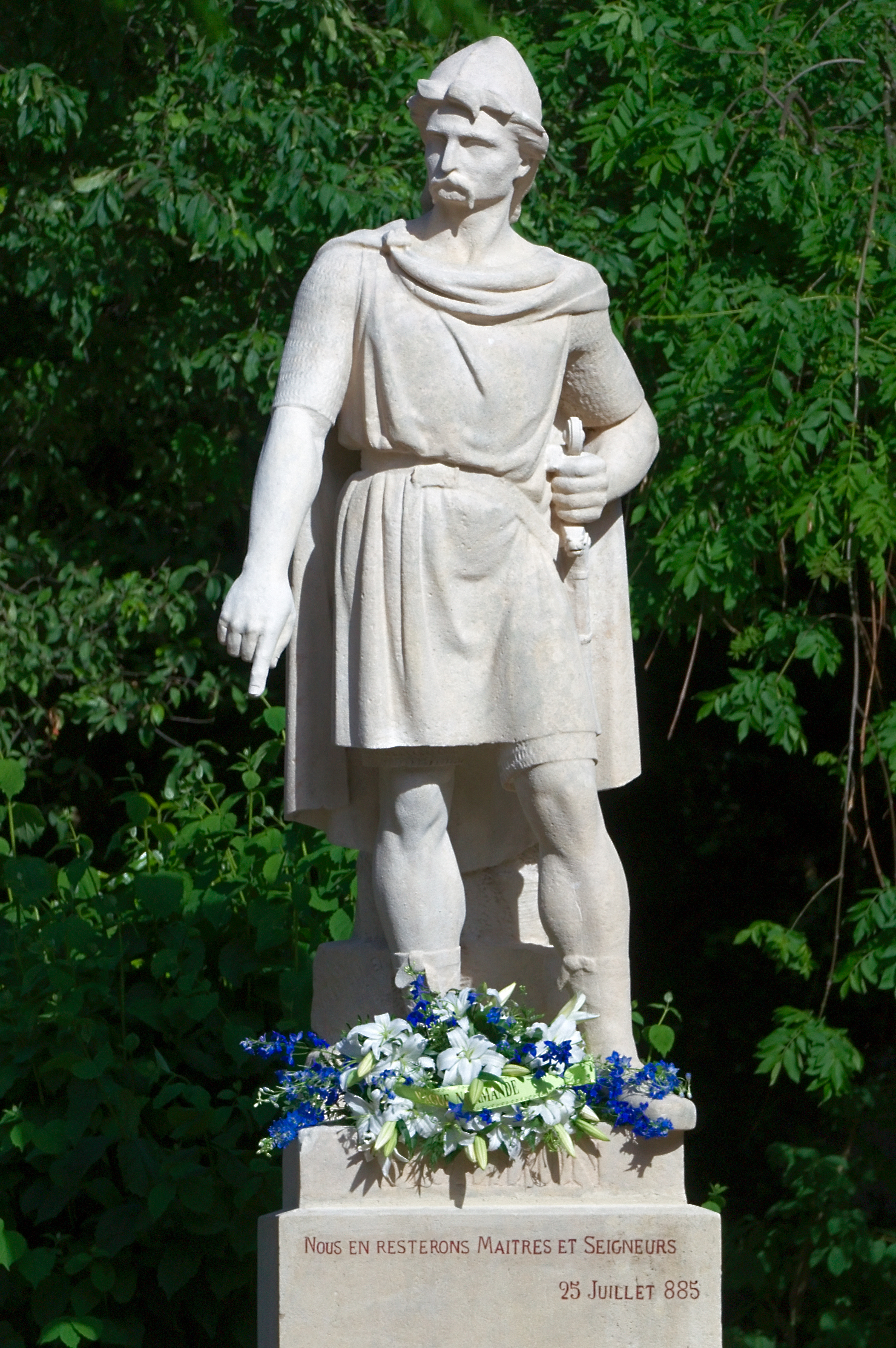 Restored version of statue of Rollon. (Statue de Rollon dans les jardins de l’hôtel de ville de Rouen le jour de son inauguration après sa restauration.)